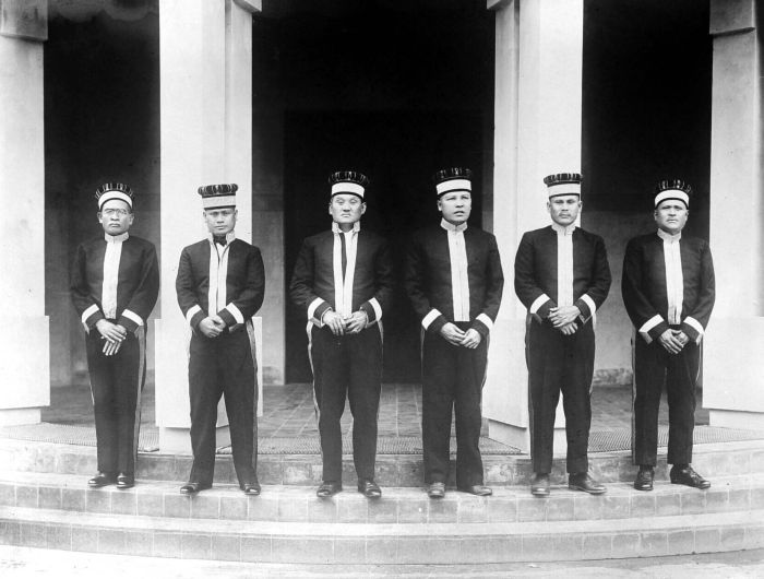 Repronegatief. Hoofden van Simaloengoen, Oostkust Sumatra